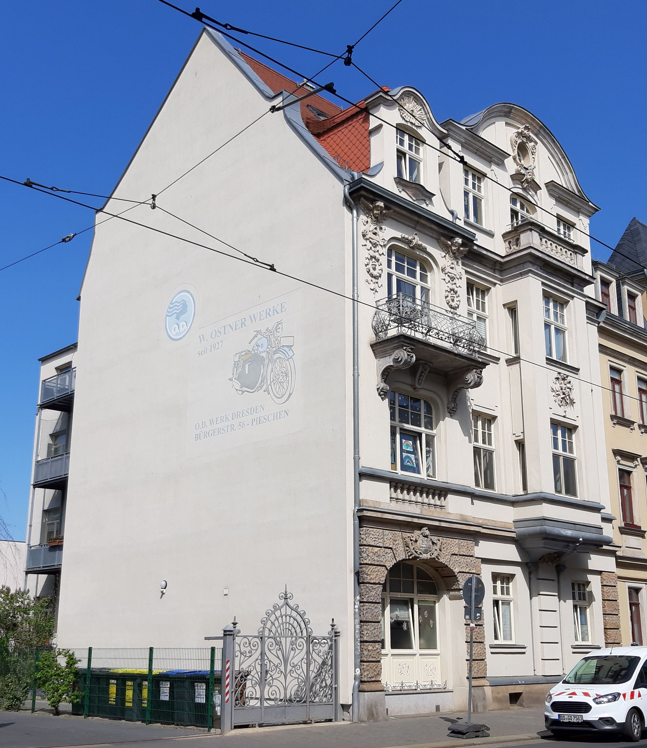 Mietshaus in halboffener Bebauung Bürgerstraße 56, Dresden-Pieschen bezeichnet 1897 markanter barockisierender Wohnbau des ausgehenden 19. Jahrhunderts, in dieser Form selten, wenn nicht gar singulär in Dresden, baugeschichtlich und künstlerisch bedeutend Wandgemälde für die Ostner Fahrzeugfabrik: W. Ostner Werke seit 1927. O.D. Werk Dresden